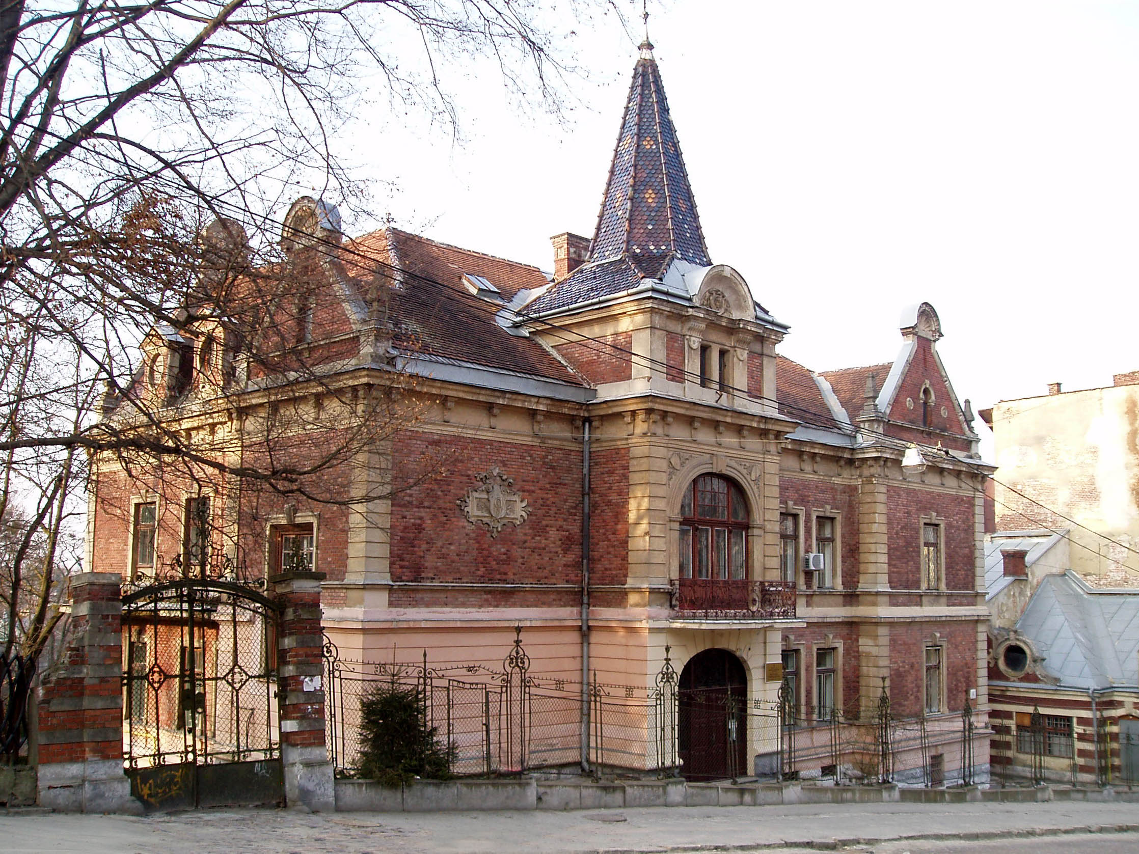 Будинок № 6 на вулиці Самчука у Львові. Збудований 1896 року за проектом Емануеля Яримовича.